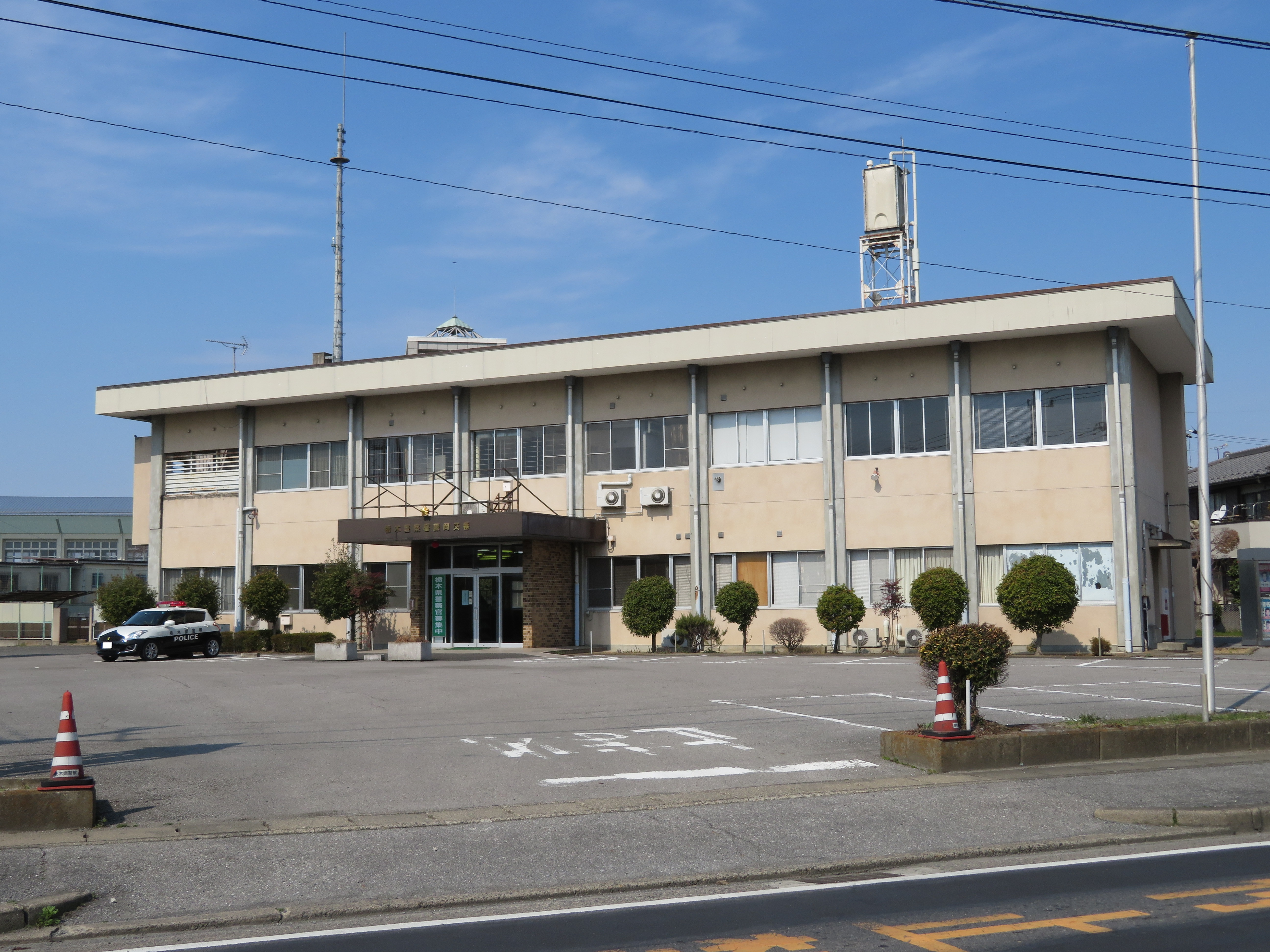 栃木警察署藤岡交番庁舎（旧藤岡警察署庁舎） Canon PowerShot SX720 HS